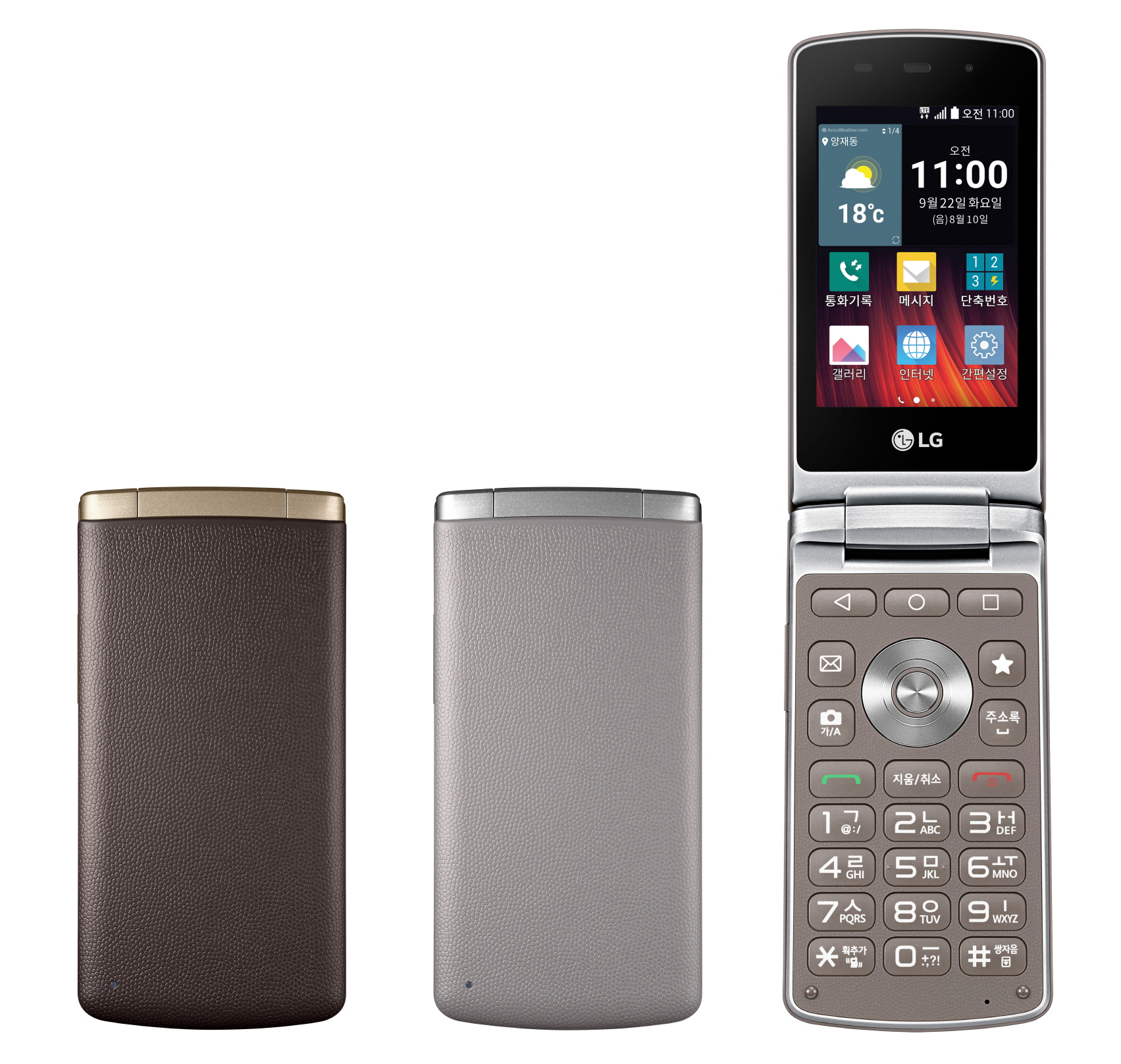 LG전자, 폴더형 스마트폰 ‘LG 와인스마트재즈’ 출시 ■ SKT, KT 통해 21일 출시… 폴더형 스마트폰 판매 채널 확대 ■ 베이지, 브라운 두 가지 색상으로 중장년층 기호 공략 ■ 자주 쓰는 앱 설정하는 ‘Q버튼’, 넓은 물리 키패드 등 편의성 강화 ※ Social LG전자 ( 에서 관련 보도자료를 확인하실 수 있습니다.